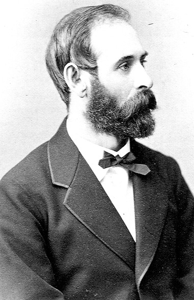 Pedro León Gallo Goyenechea (Copiapó, 12 de febrero de 1830 – Santiago, 16 de diciembre de 1877). Fue un político chileno y uno de los fundadores del Partido Radical.